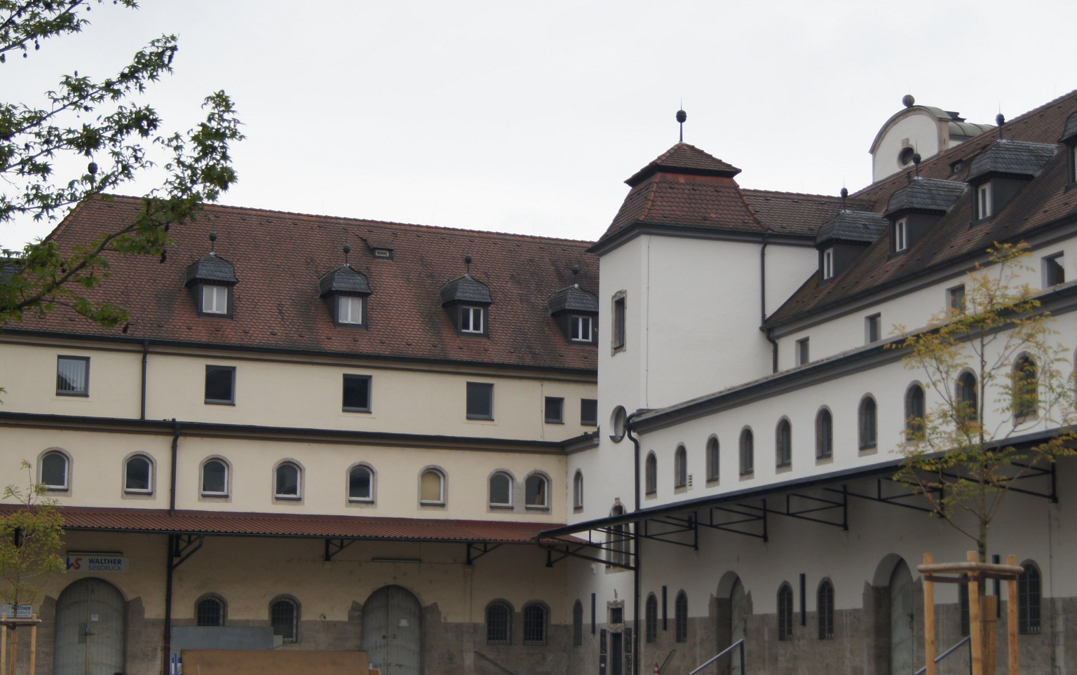 ehemaliges Hauptzollamt in Würzburg, Lagerhalle